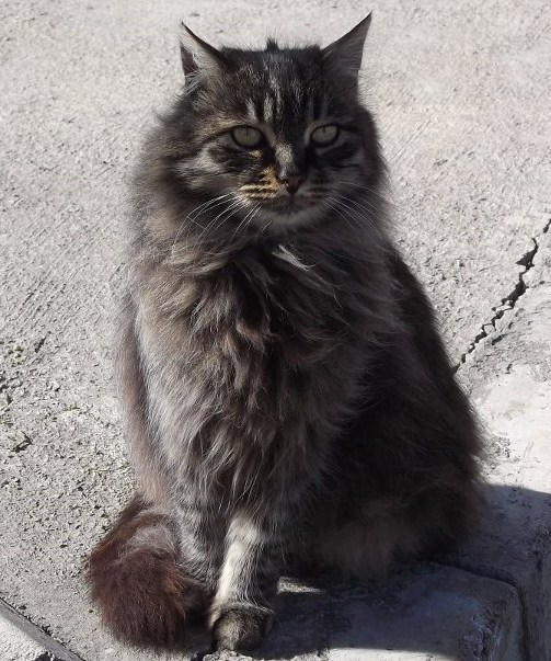 Ankara Kedisi Tekir